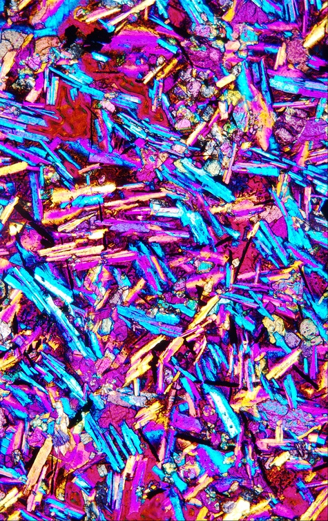 Plagioclase and Pyroxene in a Basalt.Picture taken under cross-polarized light, gypsum plate inserted.